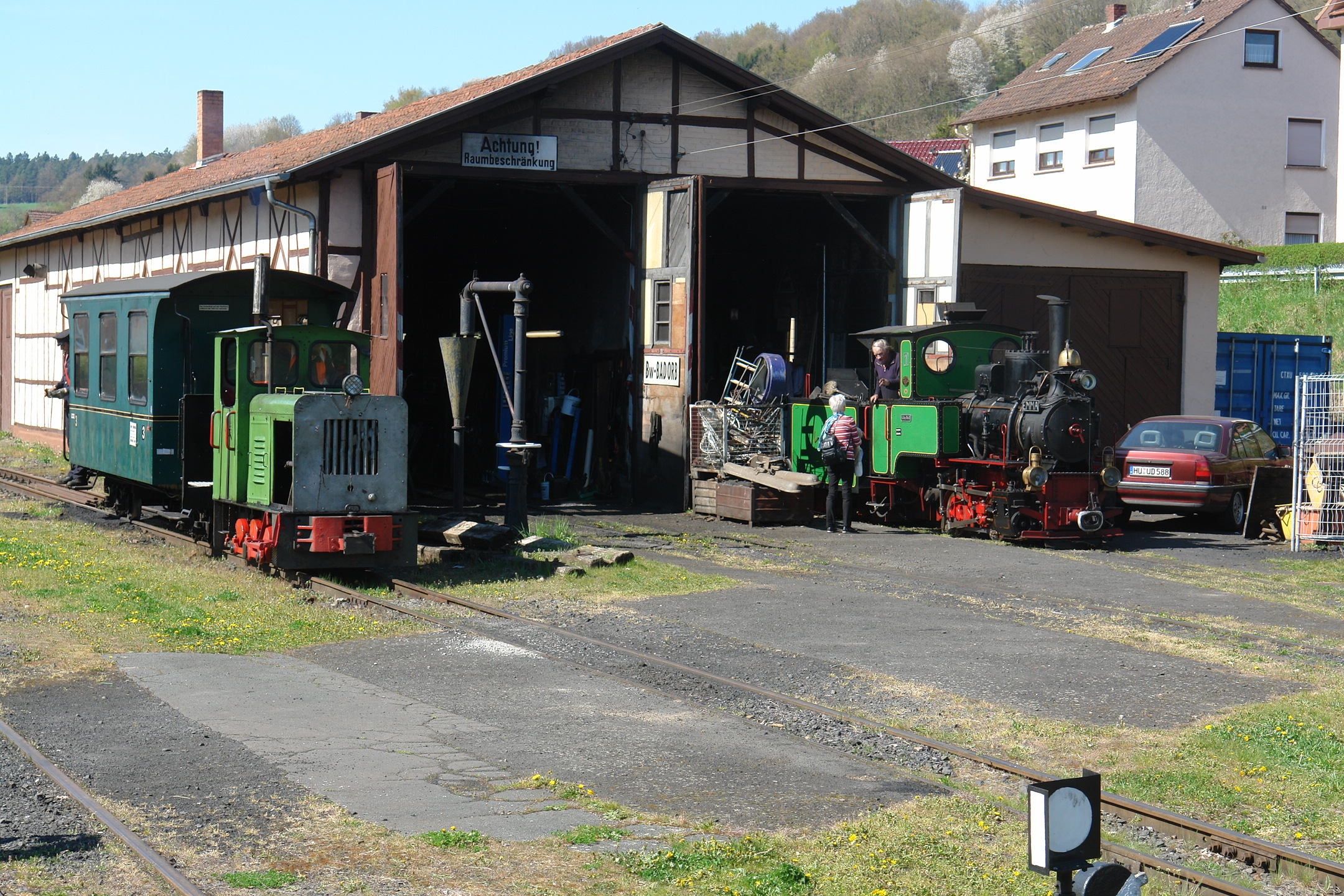 Die Bahnstrecke Wächtersbach–Bad Orb ist eine 6,5 km lange, heute schmalspurige Eisenbahnstrecke mit 600mm Spurweite (ursprünglich Normalspur), die im Bahnhof Wächtersbach beginnt und nach Bad Orb führt.